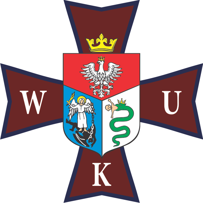 logo wku sanok